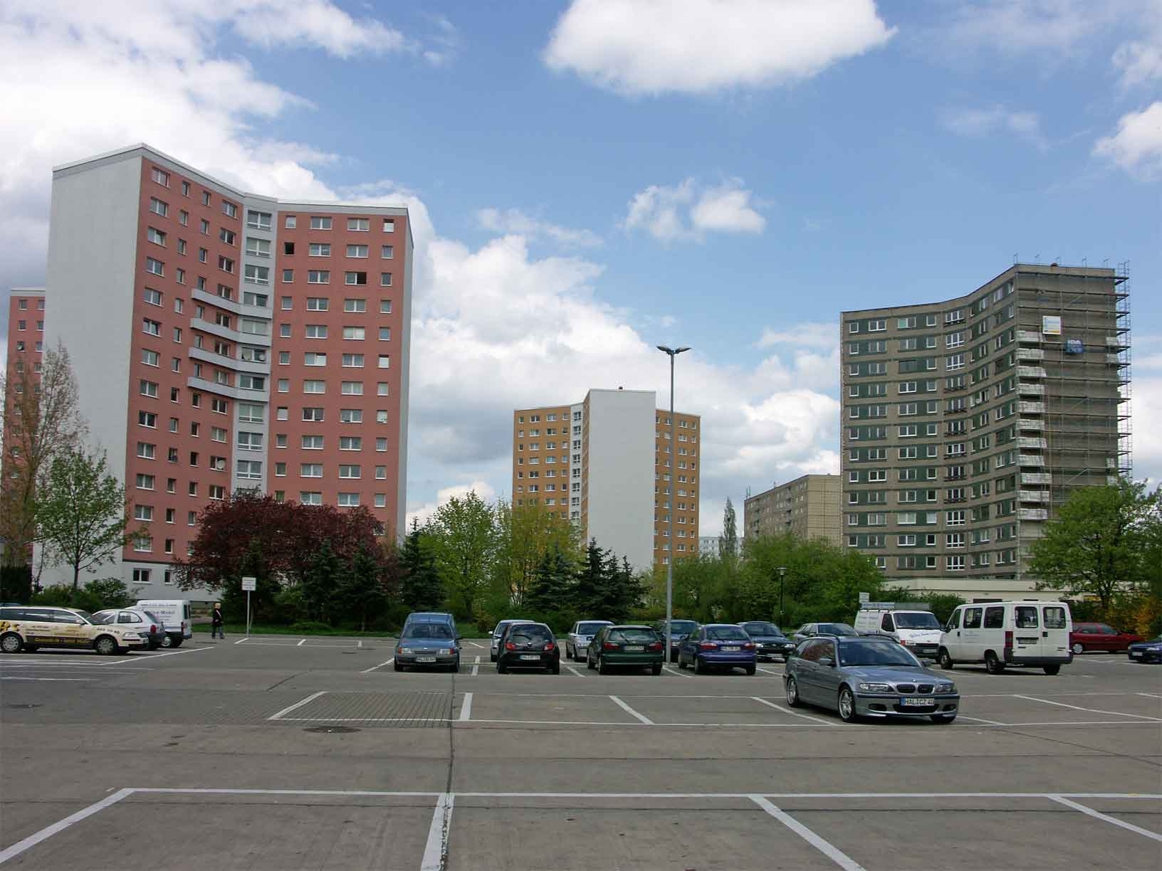 Y-Hochhäuser in Plattenbaubauweise in Halle-Neustadt, Carl-Schorlemmer-Ring, 06122 Halle (Saale), saniert und unsaniert (rechts); eigenes Foto 30-04-2006 Bettenburg